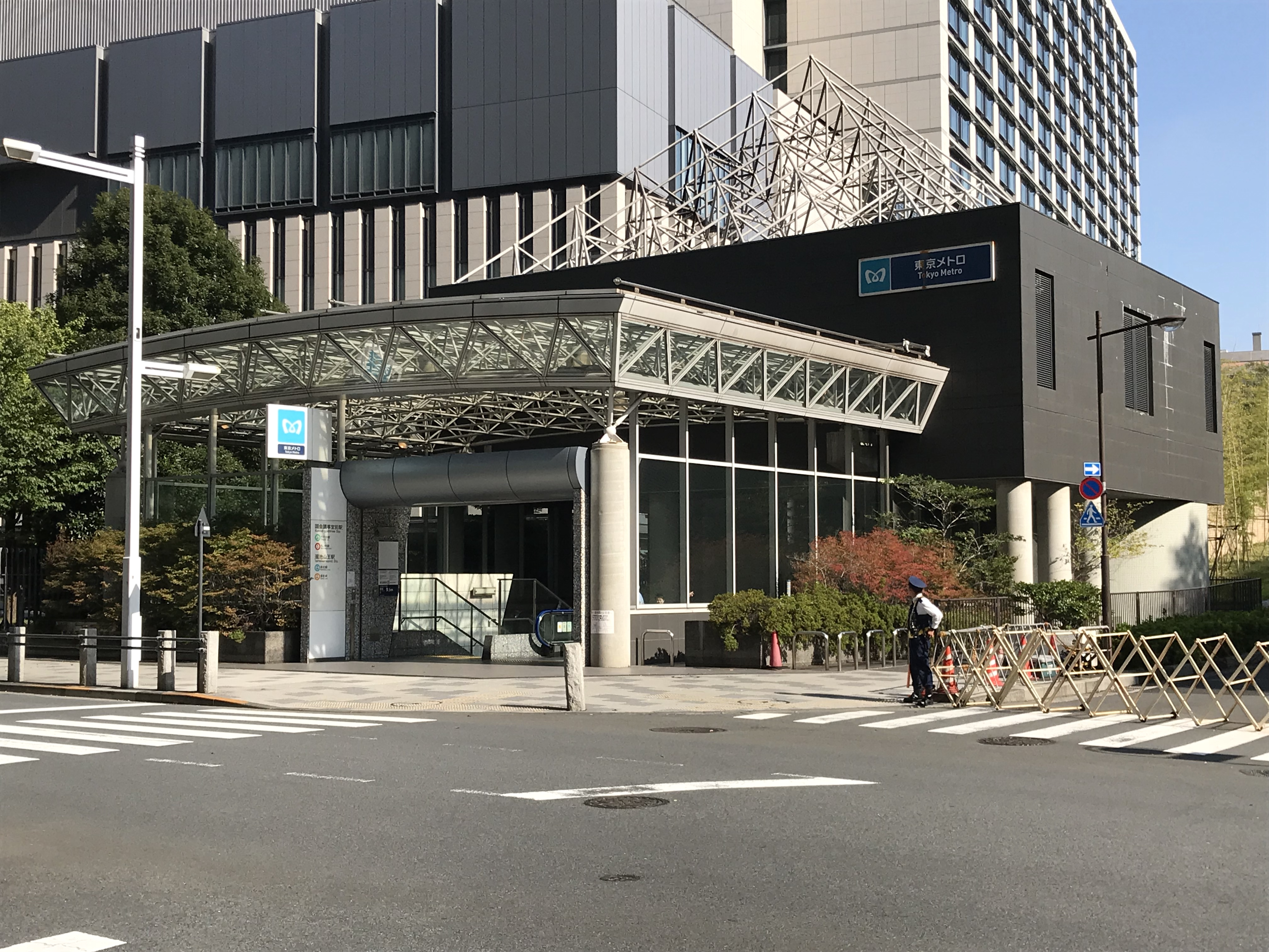 東京メトロ南北線溜池山王駅5番出入口